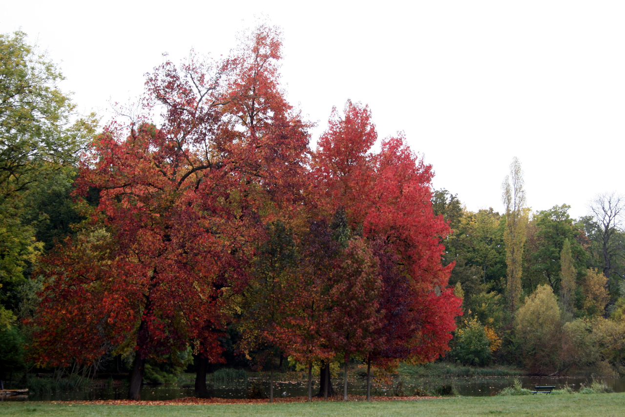 Erable a l'automne au bois de Boulogne